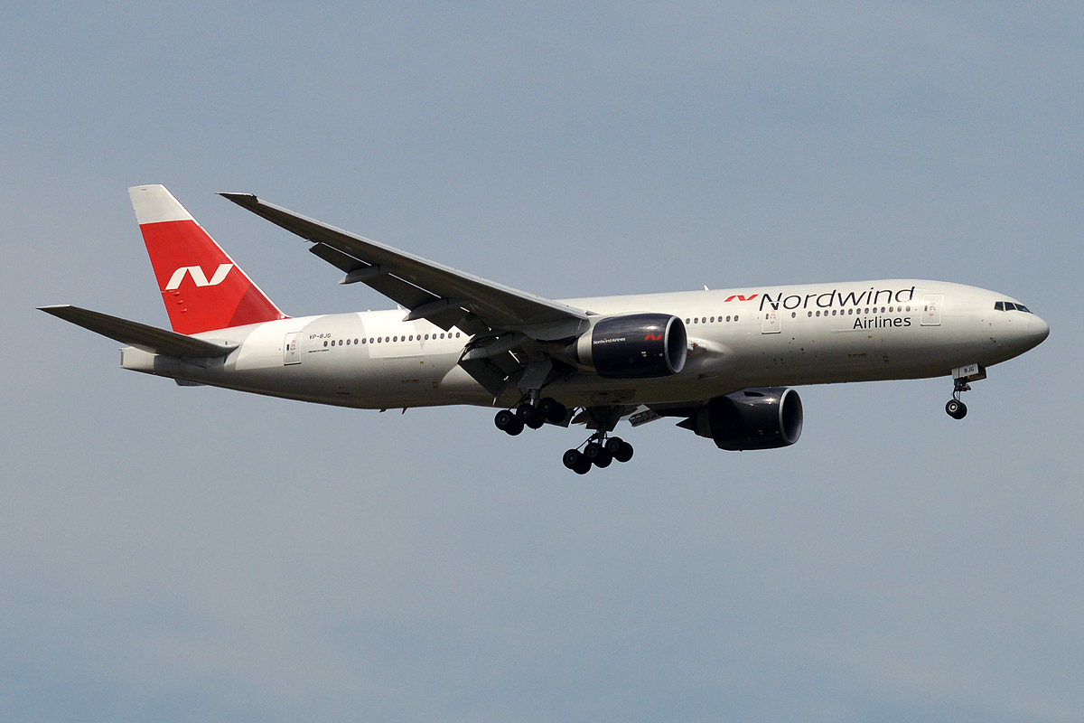 Nordwind Airlines, VP-BJG, Boeing 777-2Q8 ER